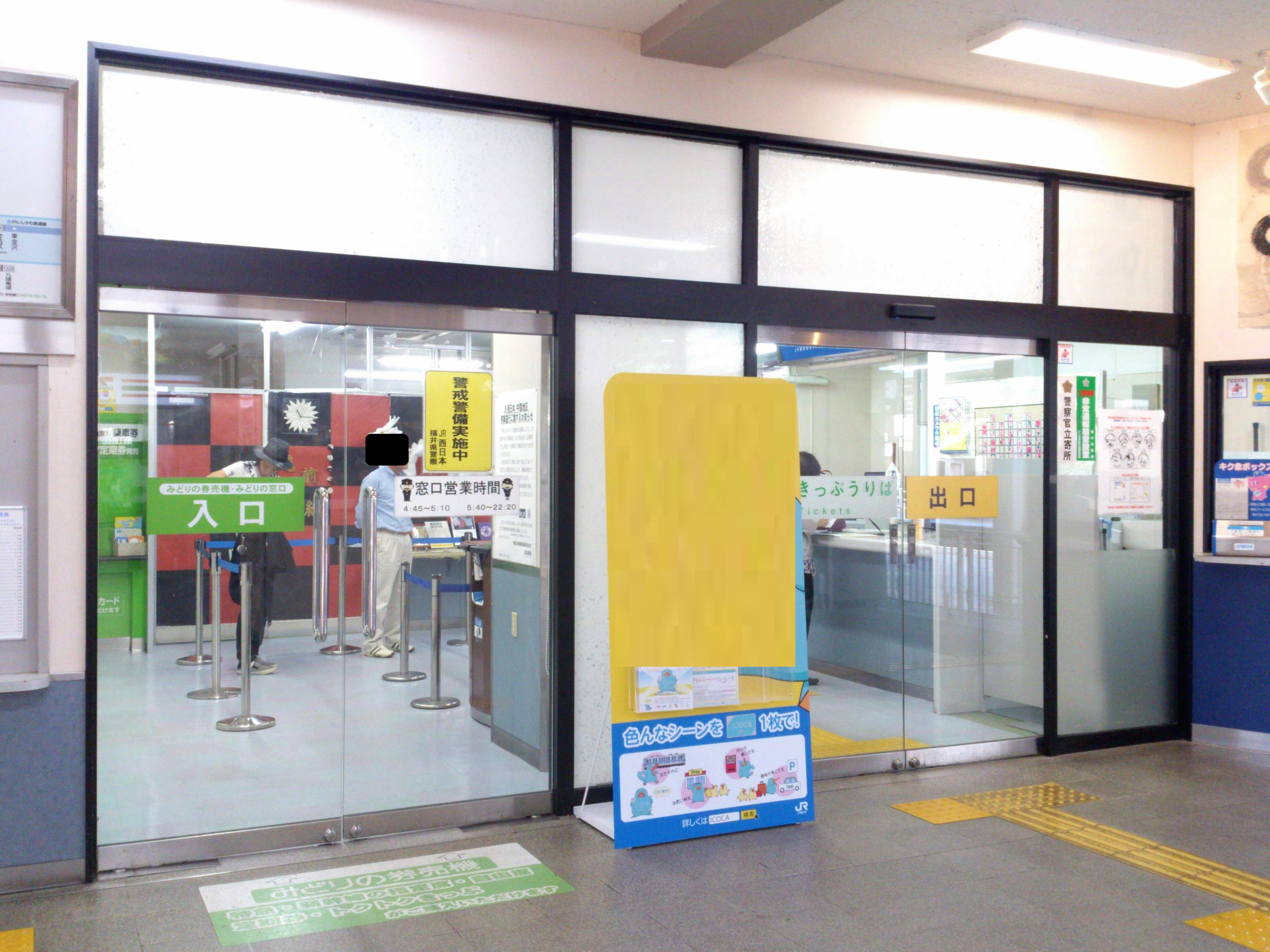 武生駅のみどりの窓口